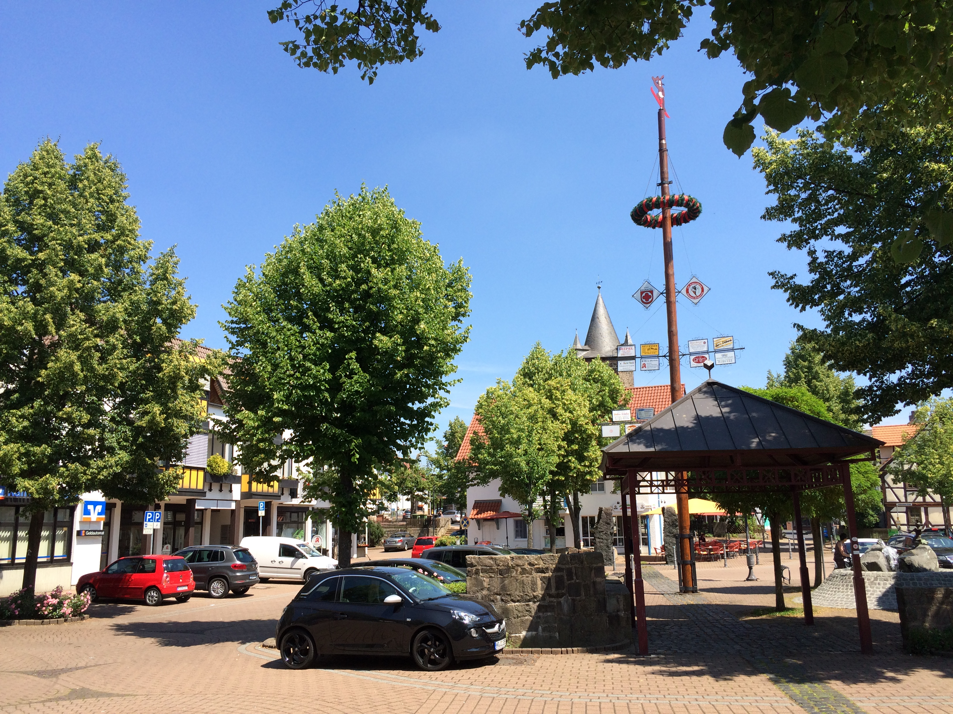 Die Ortsmitte von Großenritte, Eco Pfad Kulturgeschichte Großenritte